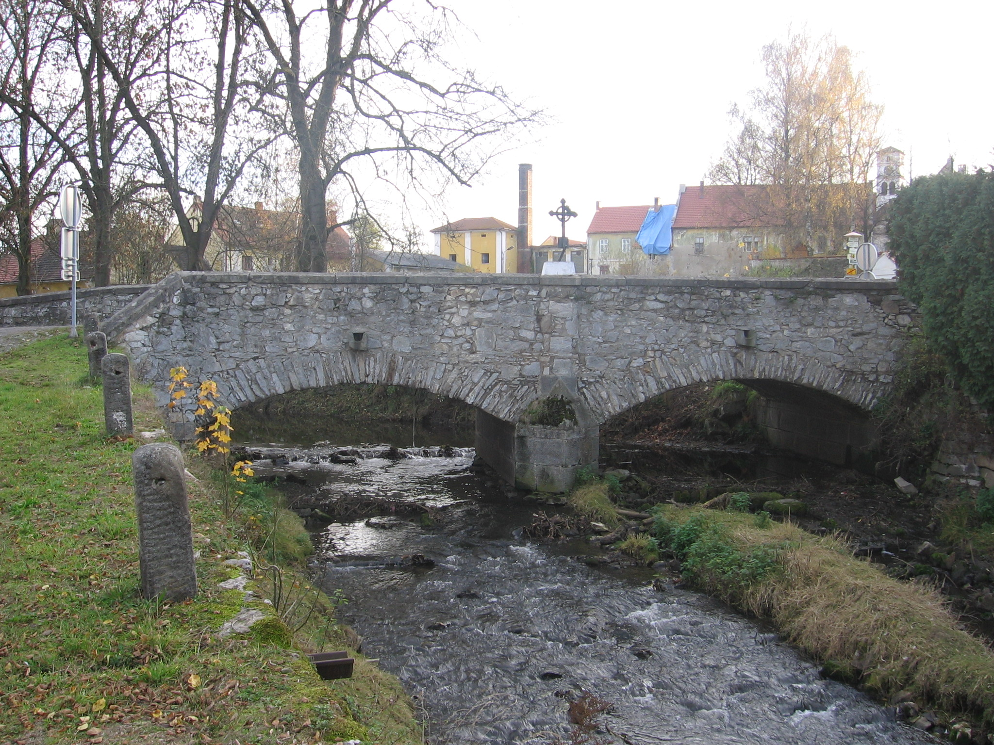 Dolní most, přes Nezdický potok, severovýchodně od zámku, Žichovice.